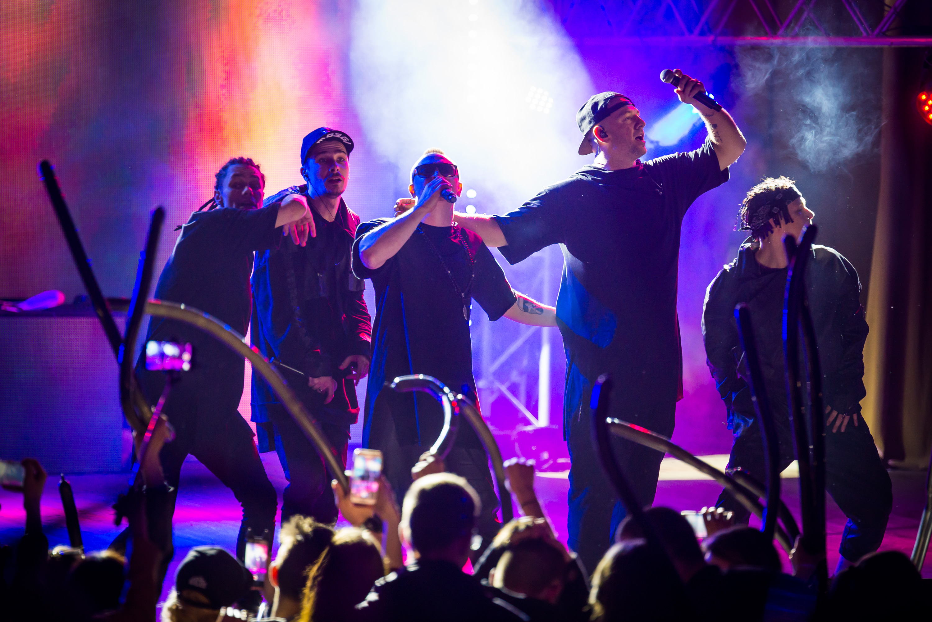 «Mozgi» — український гурт танцювальної електронної музики, під час виступу у Краматорську